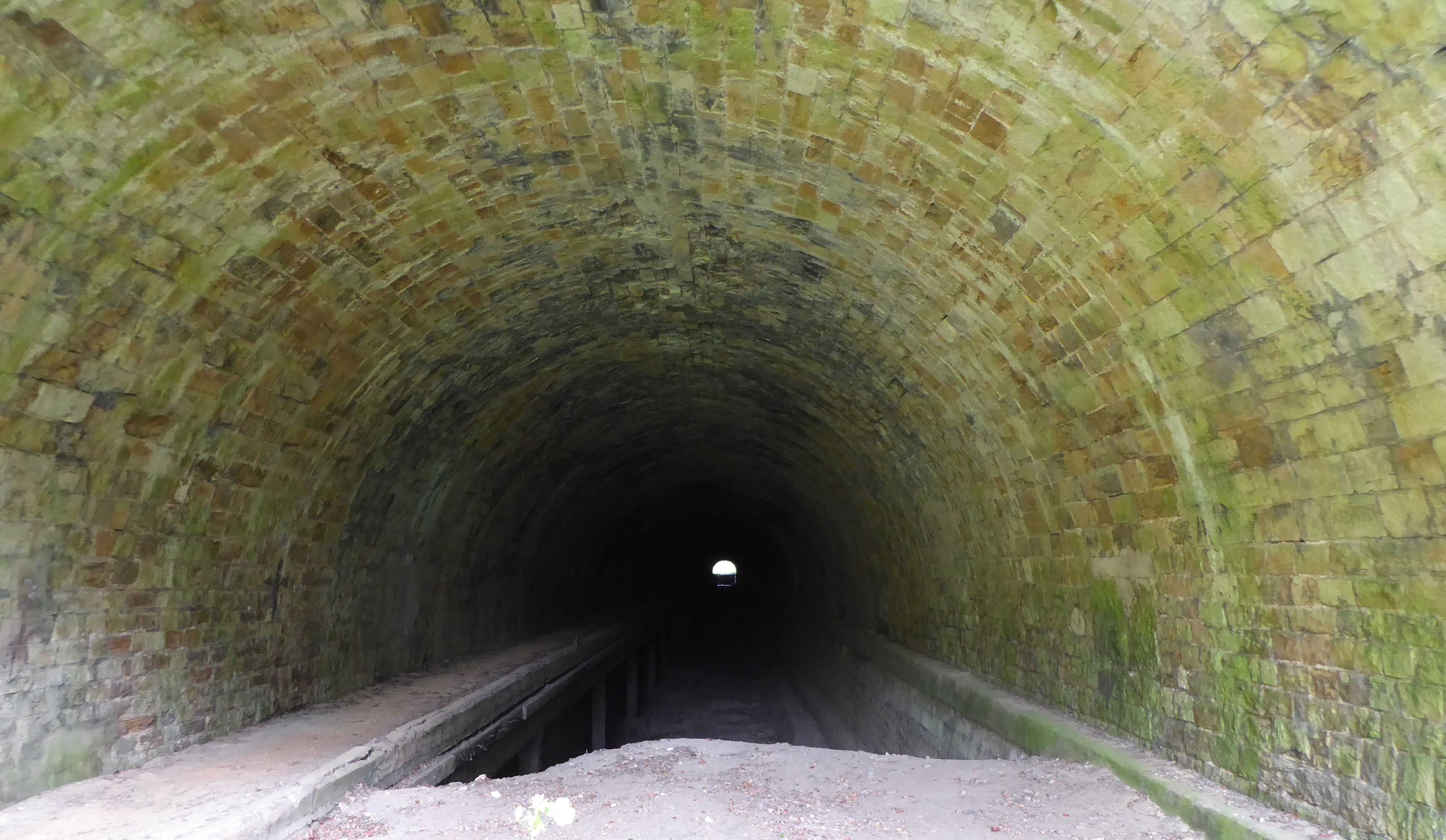 Tunnel asséché du canal de la Marne au Rhin à Liverdun, vu de l'entrée ouest côté Sous-Vignal. Après la canalisation de la Moselle, la section du canal située entre Toul et Frouard est abandonnée, remblayée en grande partie. Cependant, l'intérieur du souterrain sous la ville médiévale de Liverdun n'est pas comblé mais est fermé par des grilles. Le tunnel mesure 388 mètres de long en ligne droite sous l'éperon rocheux. À la sortie côté est (côté Maladrerie) suit une longue tranchée courbe d'environ 200 mètres. Sur la gauche l'ancien chemin de halage.